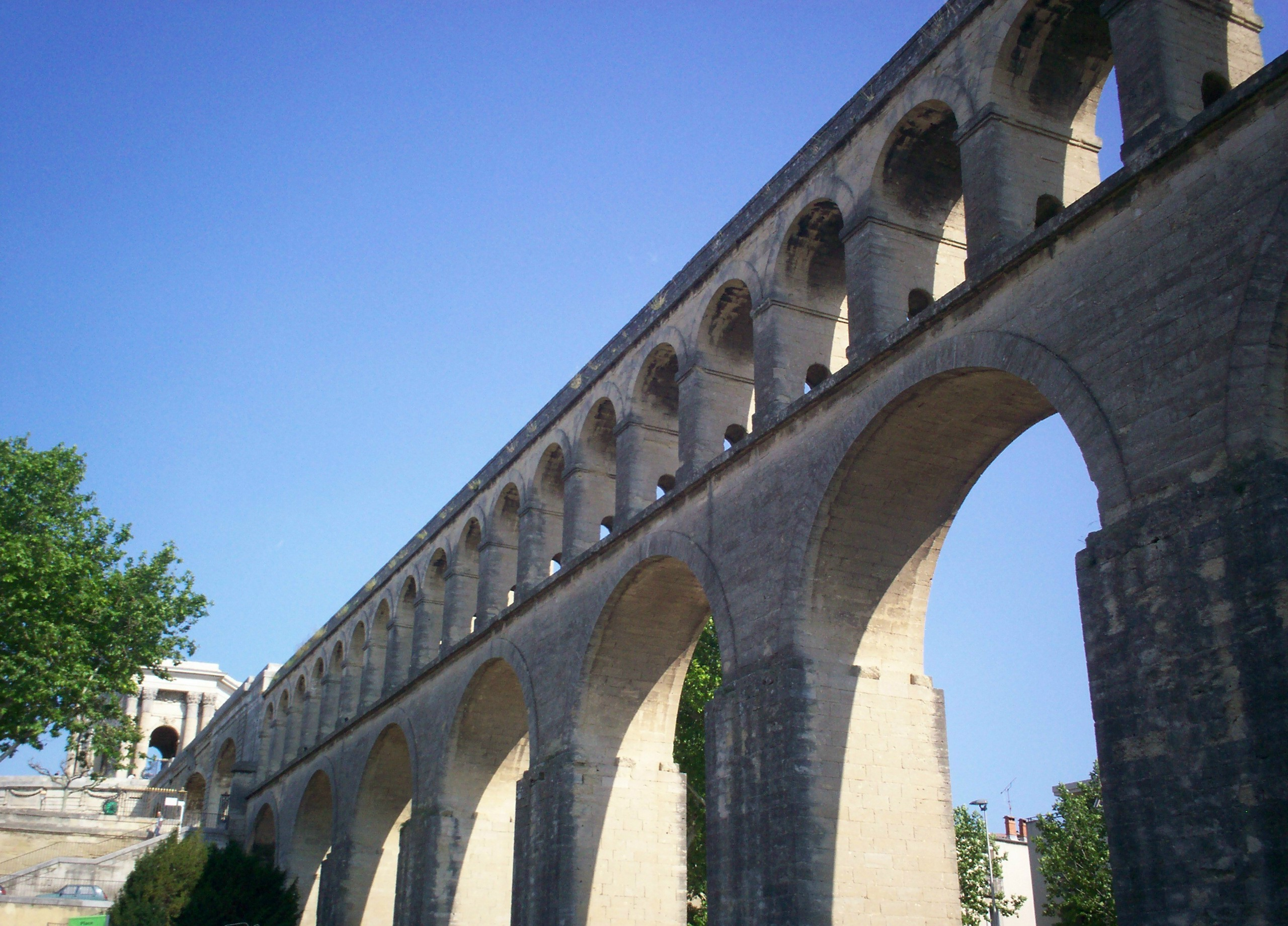 Fotografia personala